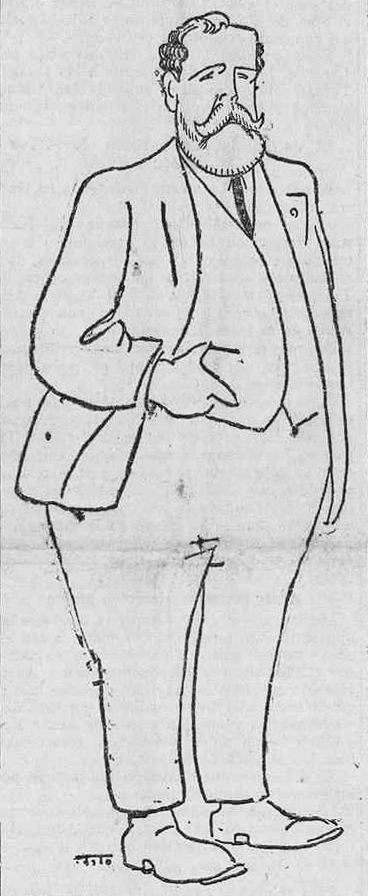 Hermen Anglada.